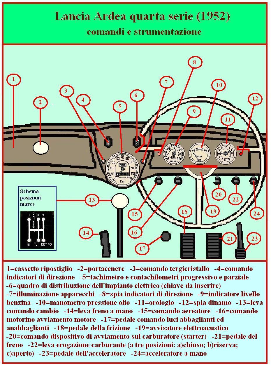 Disegno eseguito dal sottoscritto (Giomayo) utilizzando il programma "Paint" di Windows ispirandomi (ed attingendo i dati necessari) da una serie di pubblicazioni, tra cui principalmente la rivista Quattroruote numero 7 dell'anno 1959